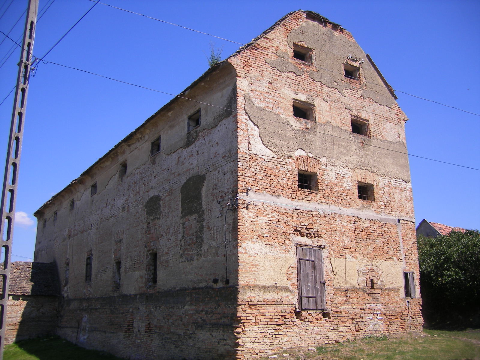 Szákszend - 18. században épült műemlék magtár Szákon This is a photo of a monument in Hungary. Identifier: 6372